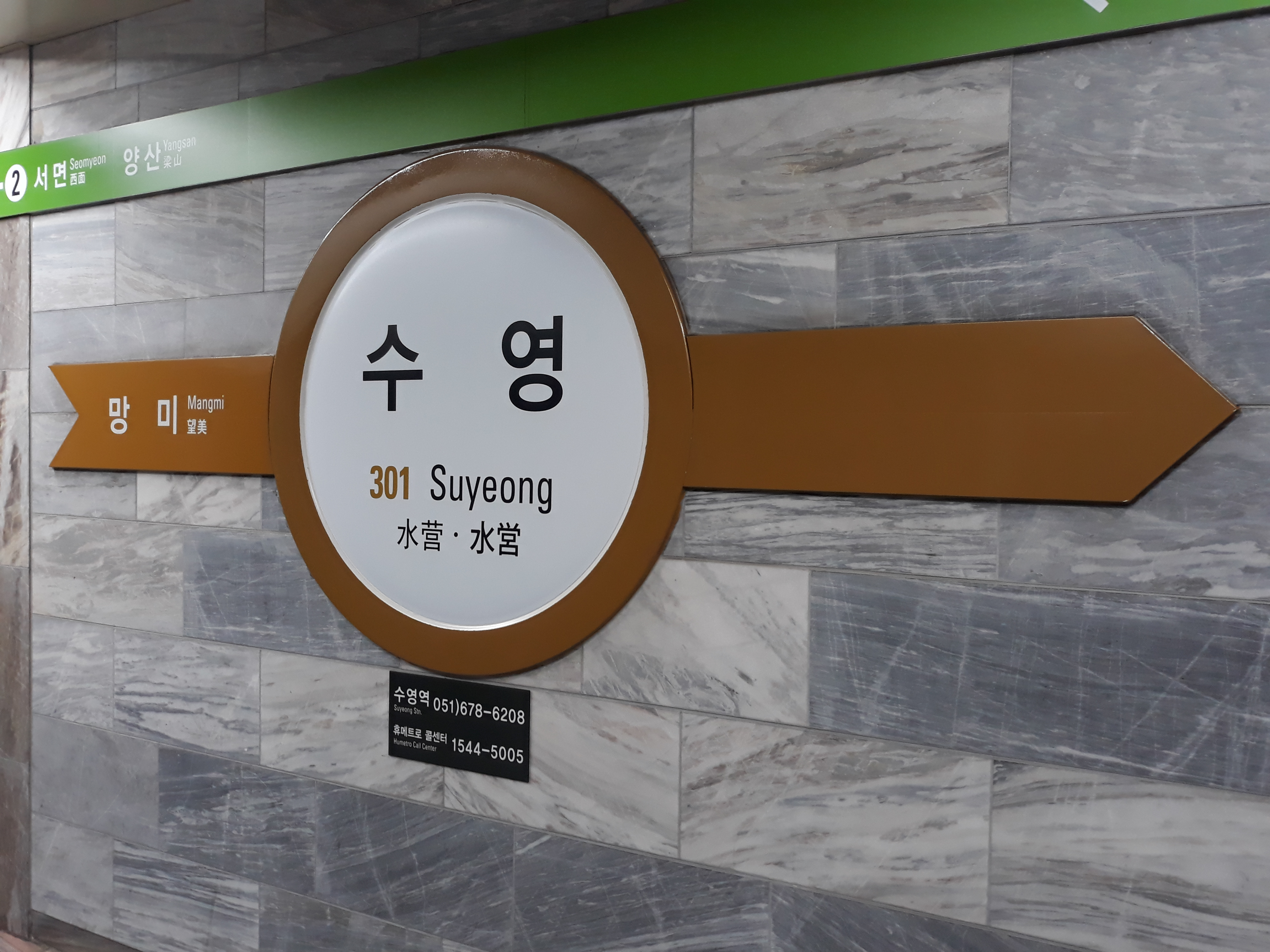 부산 도시철도 3호선 수영역 당역 종착 역명판